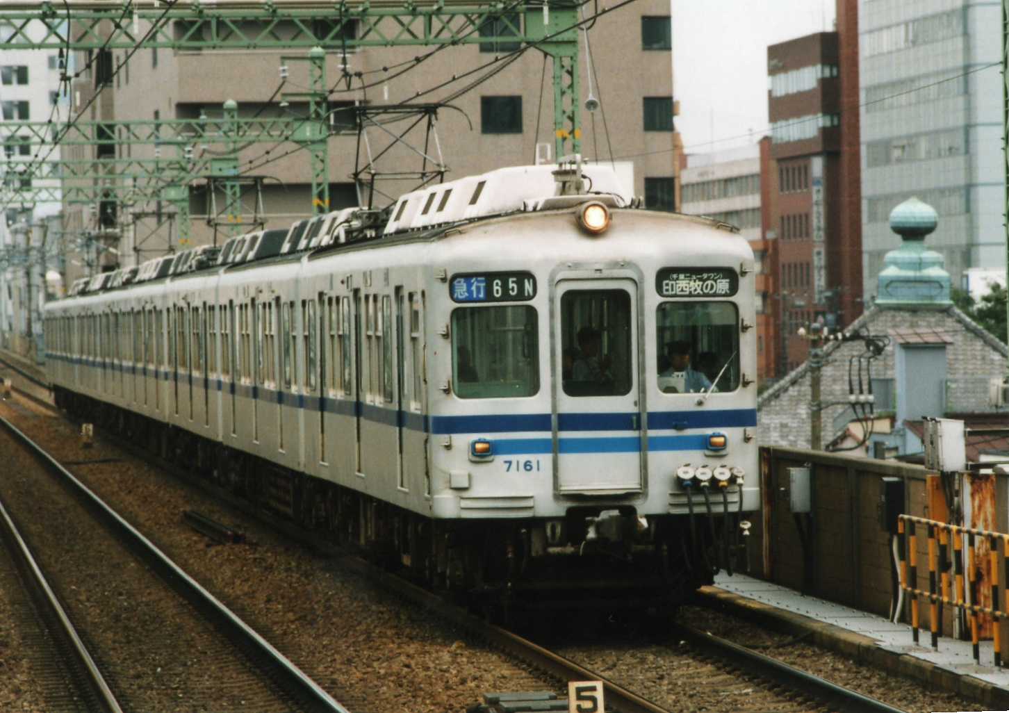 北総7161編成 新馬場駅にて撮影